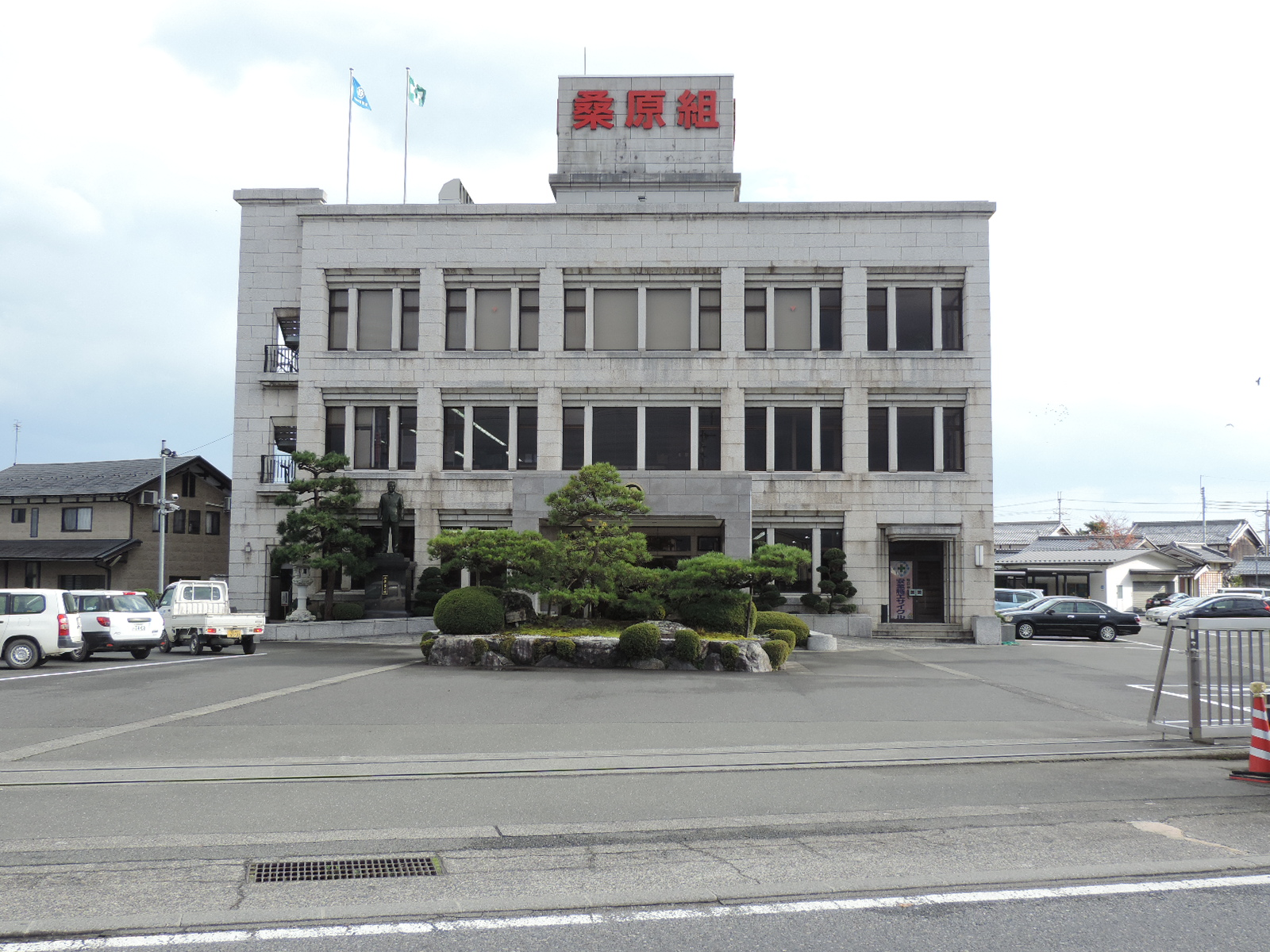 桑原組本社（滋賀県高島市。2017年撮影）